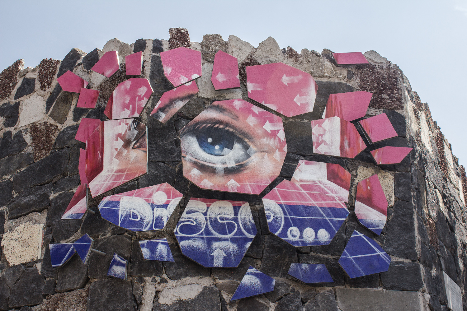 Detalle de obra Memorial New's Divine: Nunca más